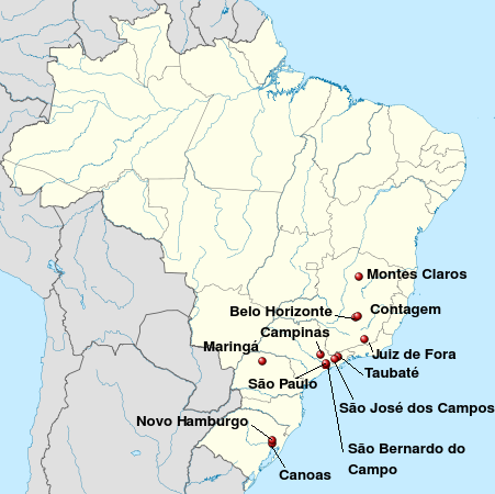 Cidades sede das equipes da Superliga Brasileira de Voleibol Masculino de 2014/2015 - Série A